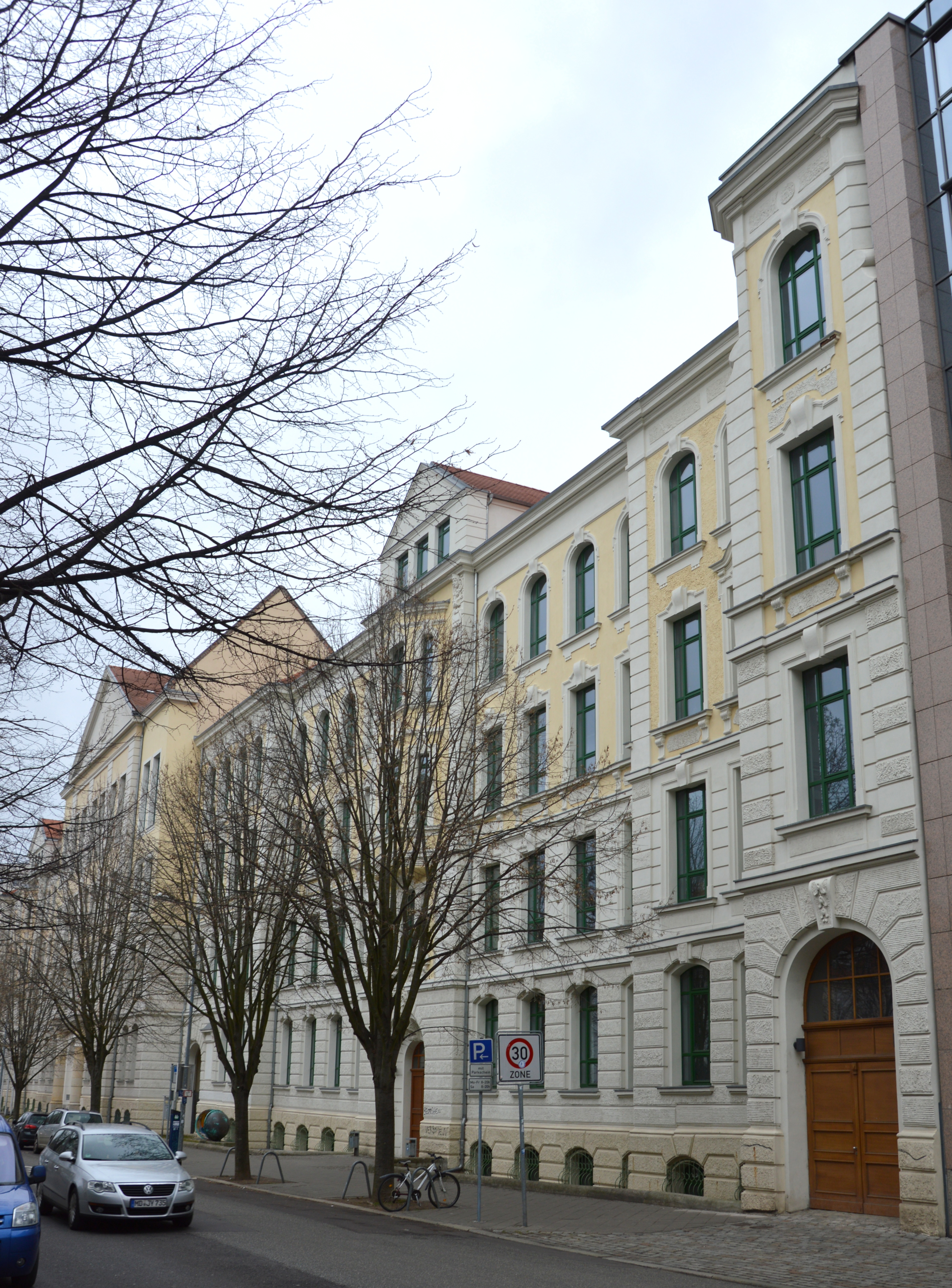 Schule Am Krökentor